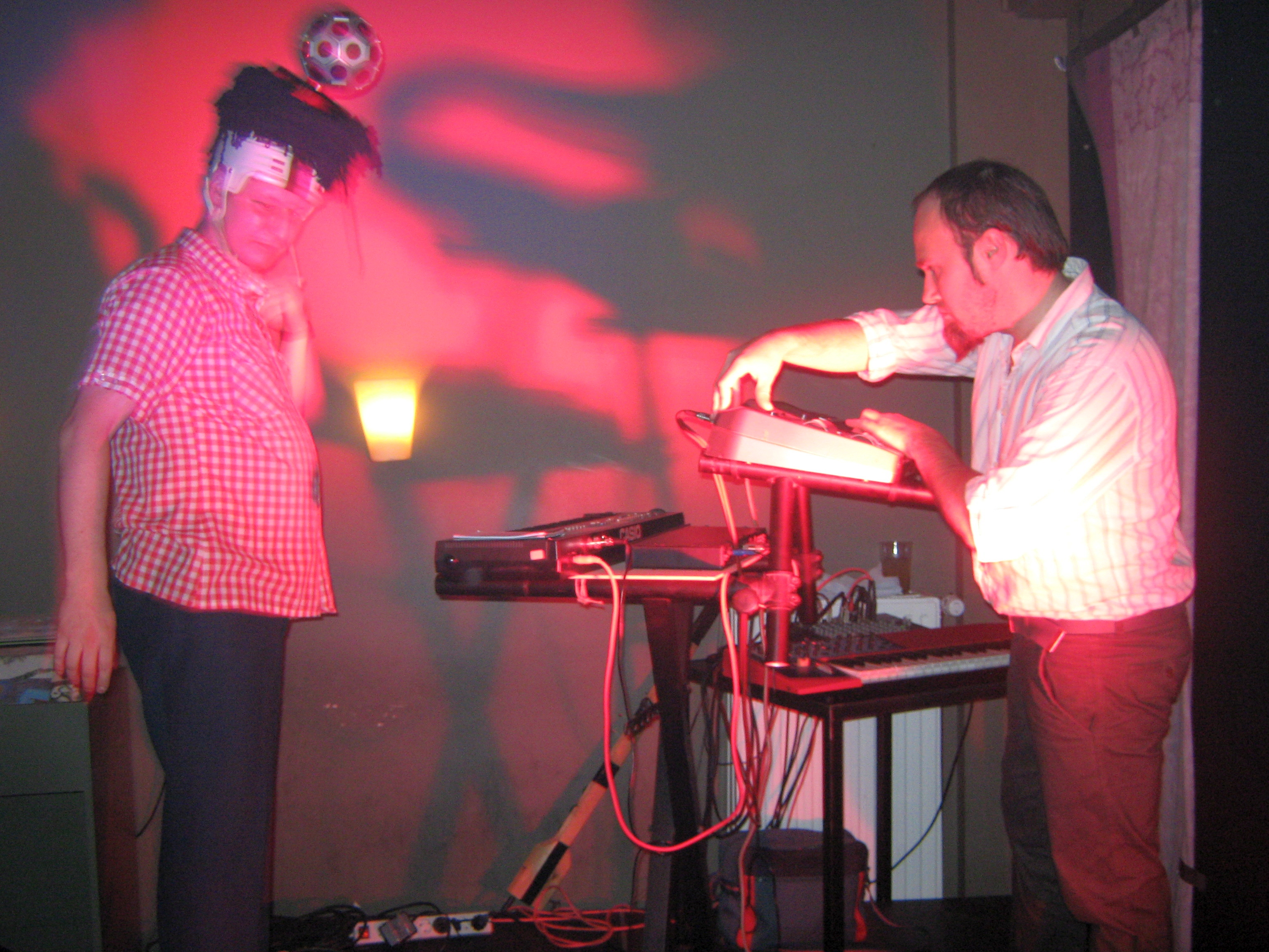 Holosud live im August 2009 in Köln